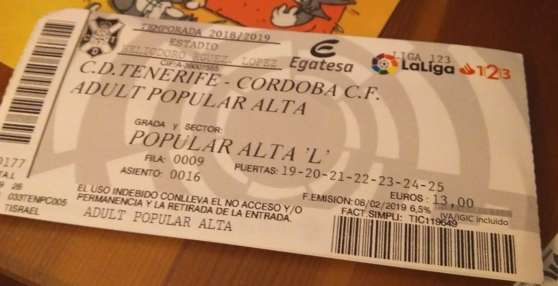 Entrada para ver el partido entre el Tenerife y el Córdoba en febrero de 2019 (temporada 2018-19)